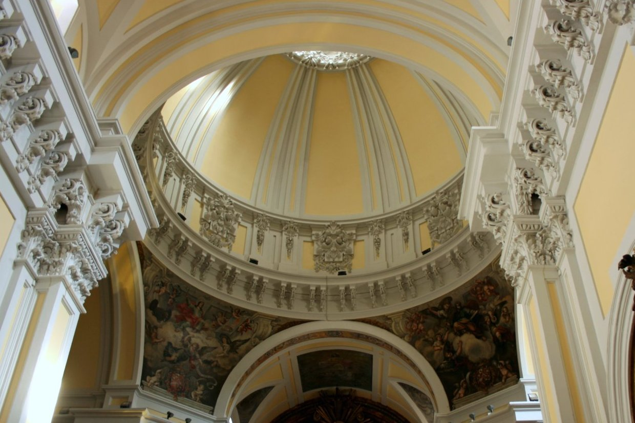 Interior de la Iglesia del convento de las mercedarias descalzas, conocidas como las Góngoras. Madrid. Obra de Manuel del Olmo.